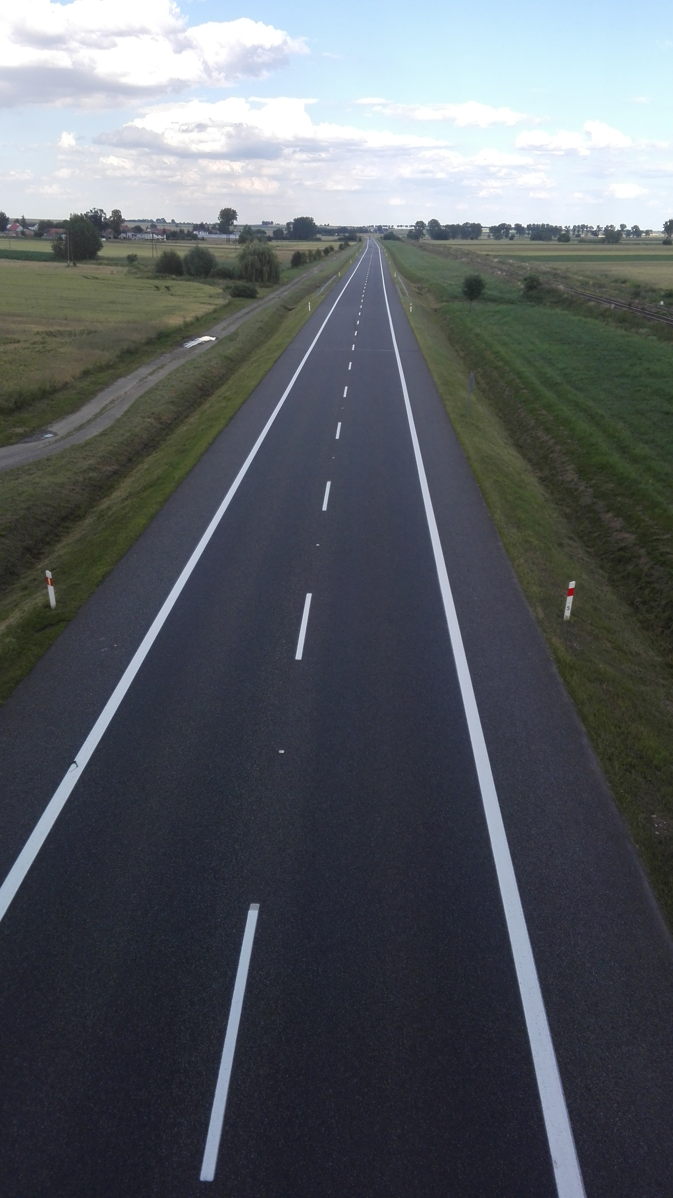 Obwodnica miejscowości Lubrza w ciągu drogi krajowej nr 40